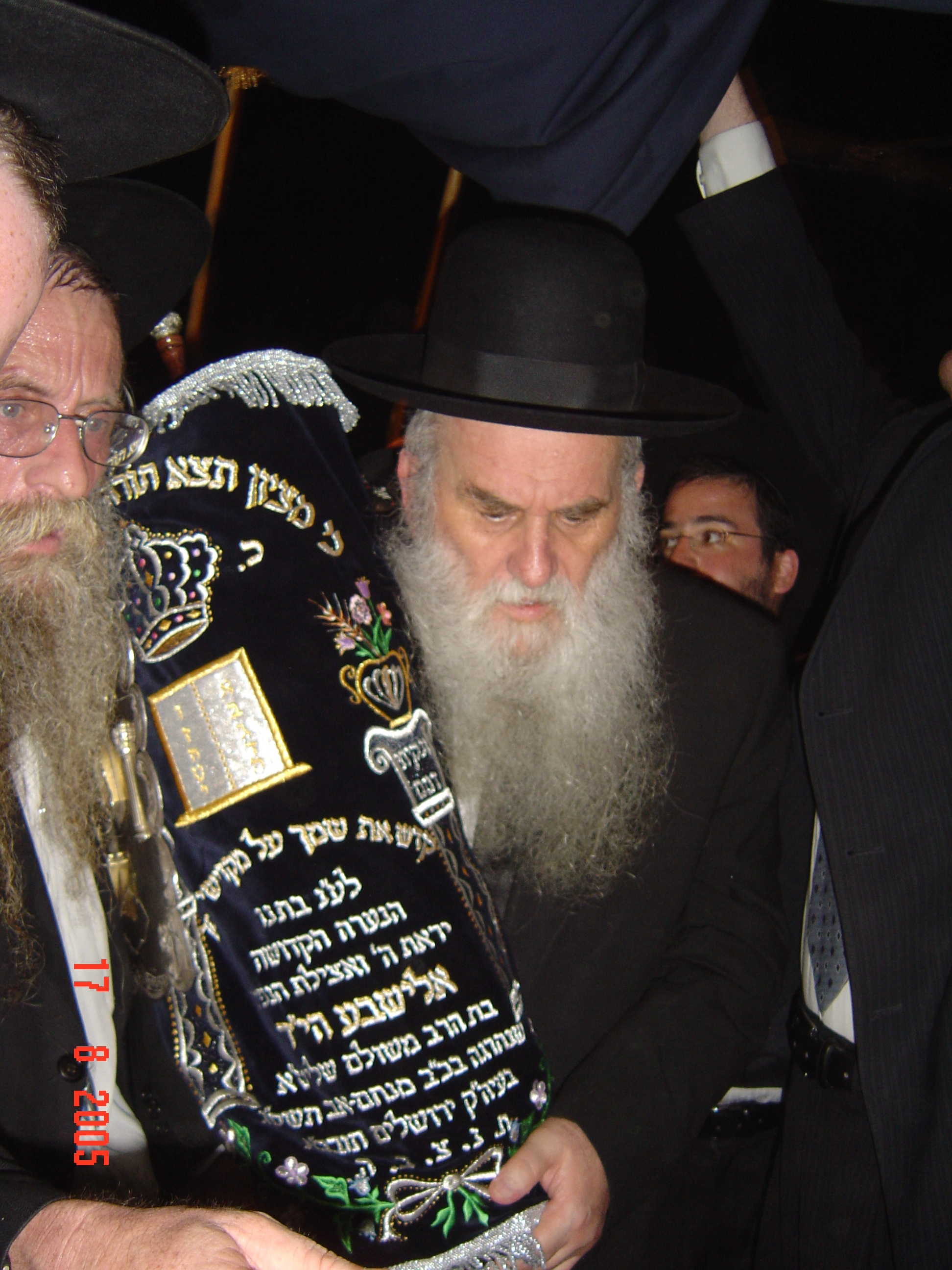 הרב דב צבי קרלנשטיין